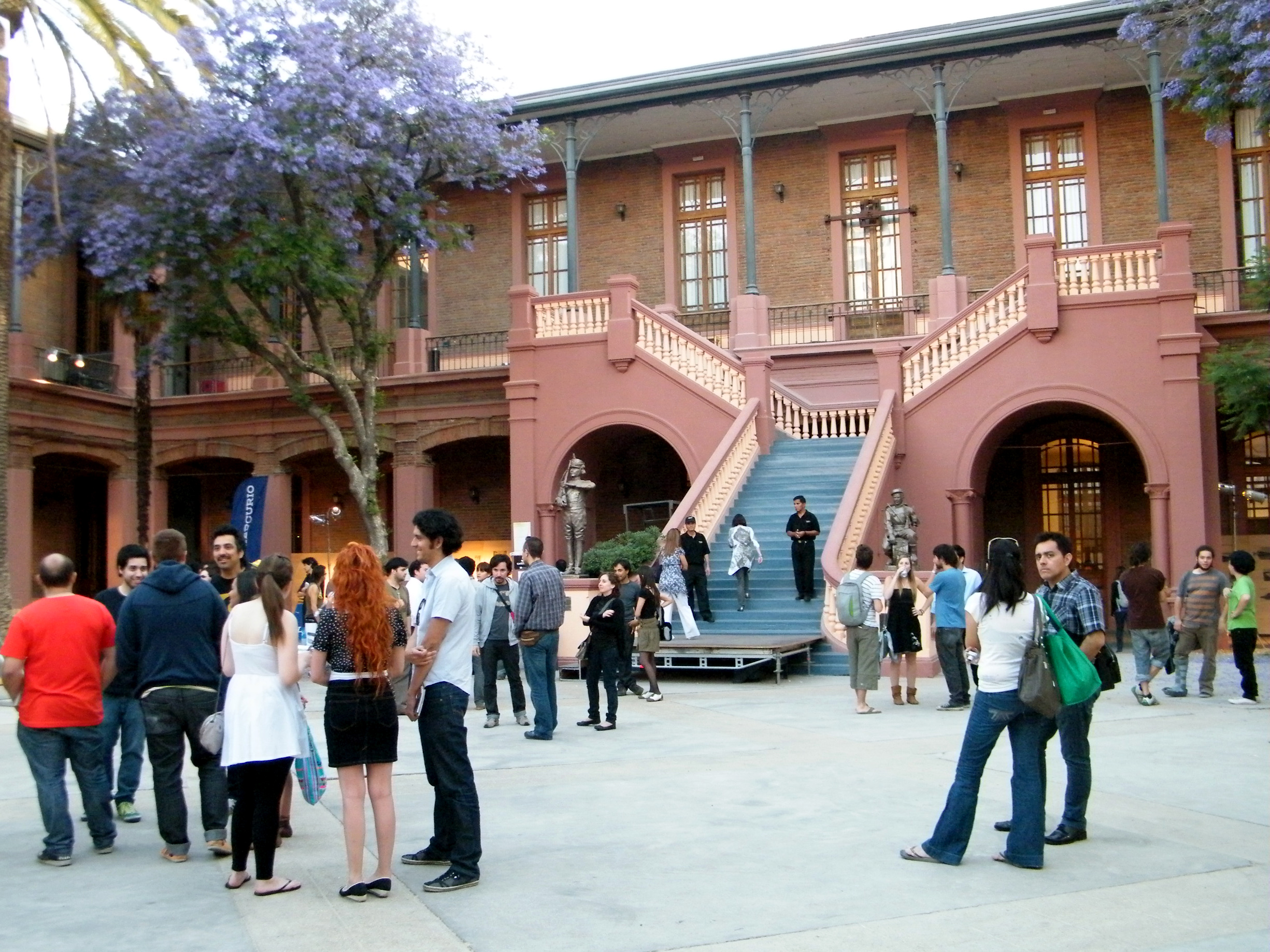 Patio de la antigua escuela militar durante el desarrollo de la Bienal de Arquitectura 2008. This is a photo of a national monument in Chile: 213